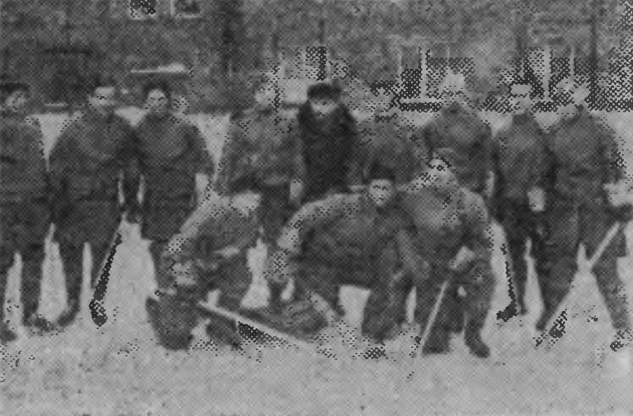 Drużyna Stali Rzeszów w hokeju na lodzie.